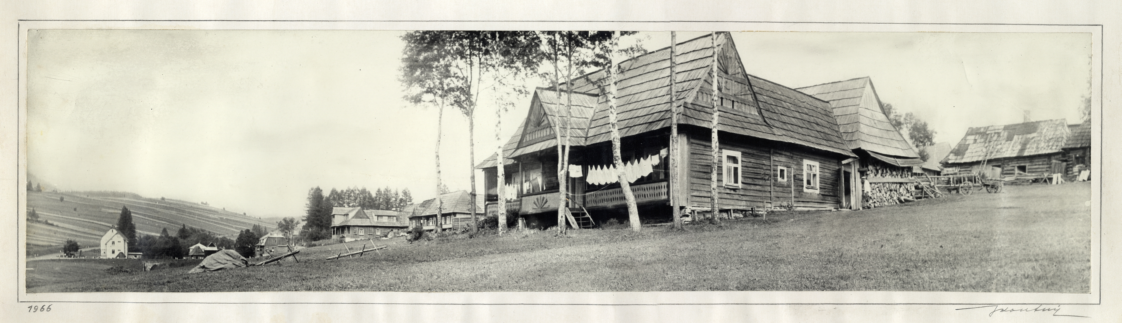 Sken panoramatické fotografie.